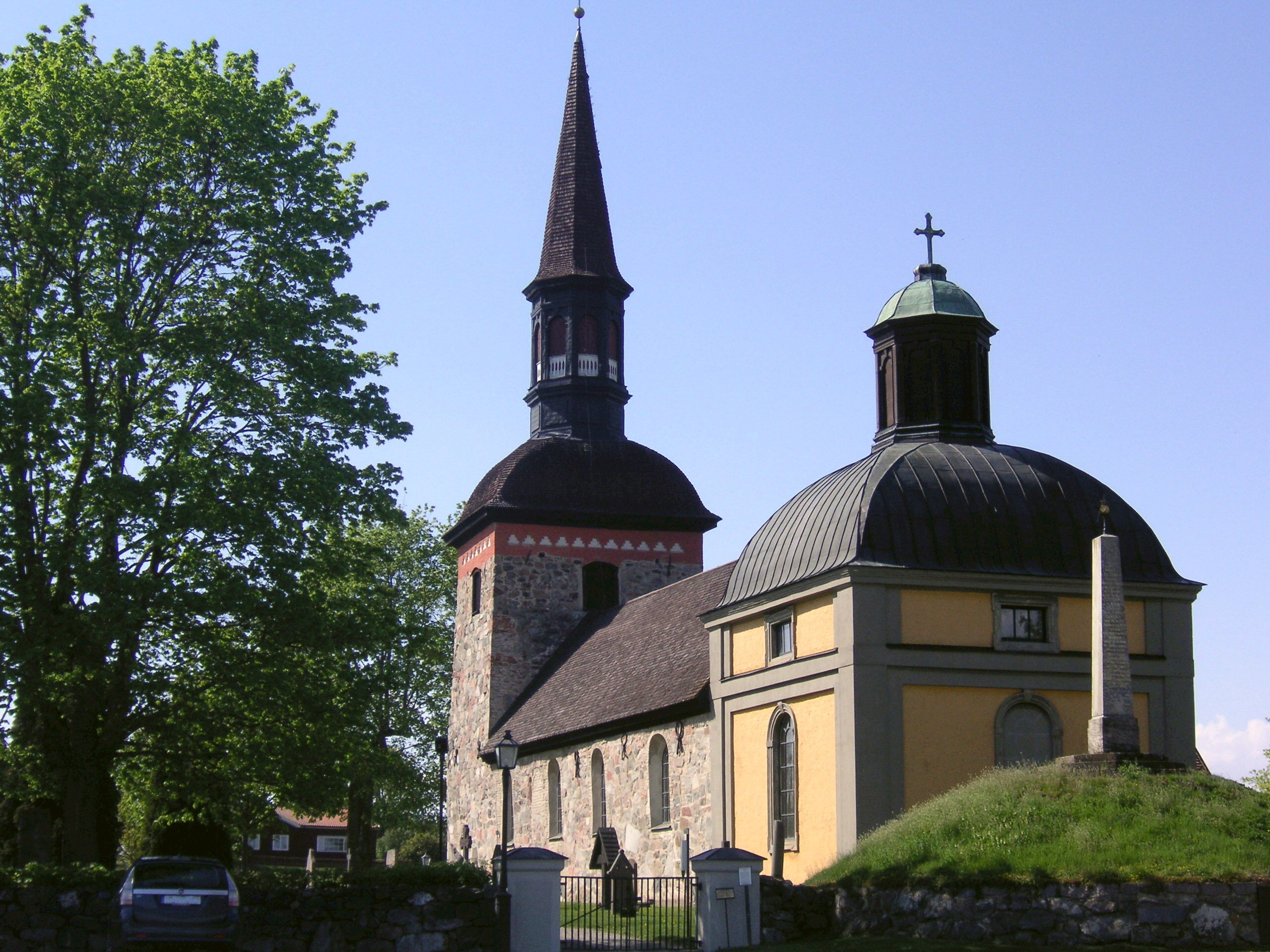 Lovö kyrka på Lovön, Ekerö kommun.